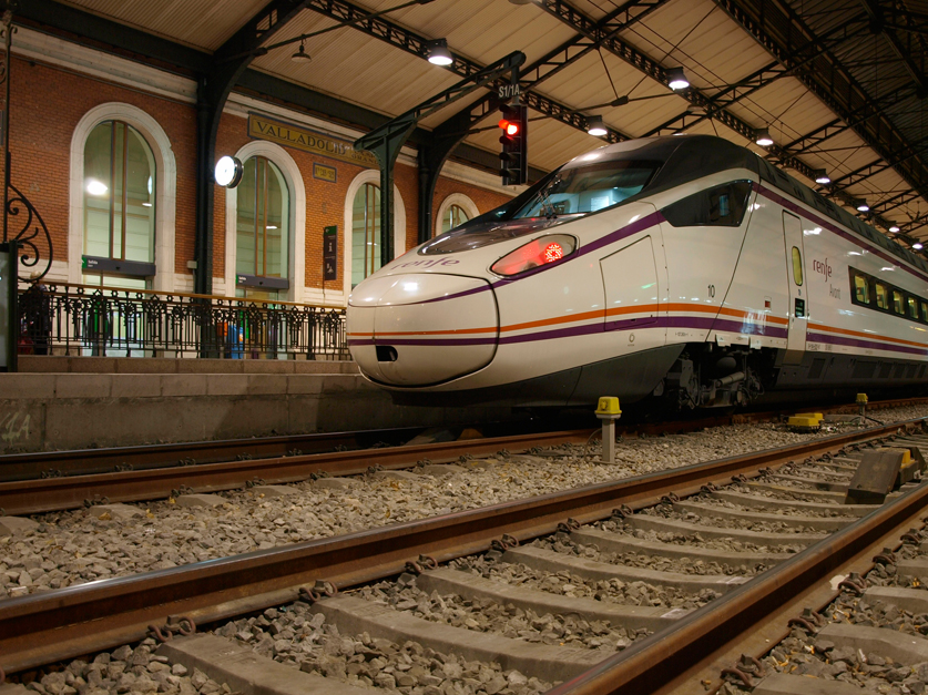 Avant. Estación Campo-Grande (Valladolid)